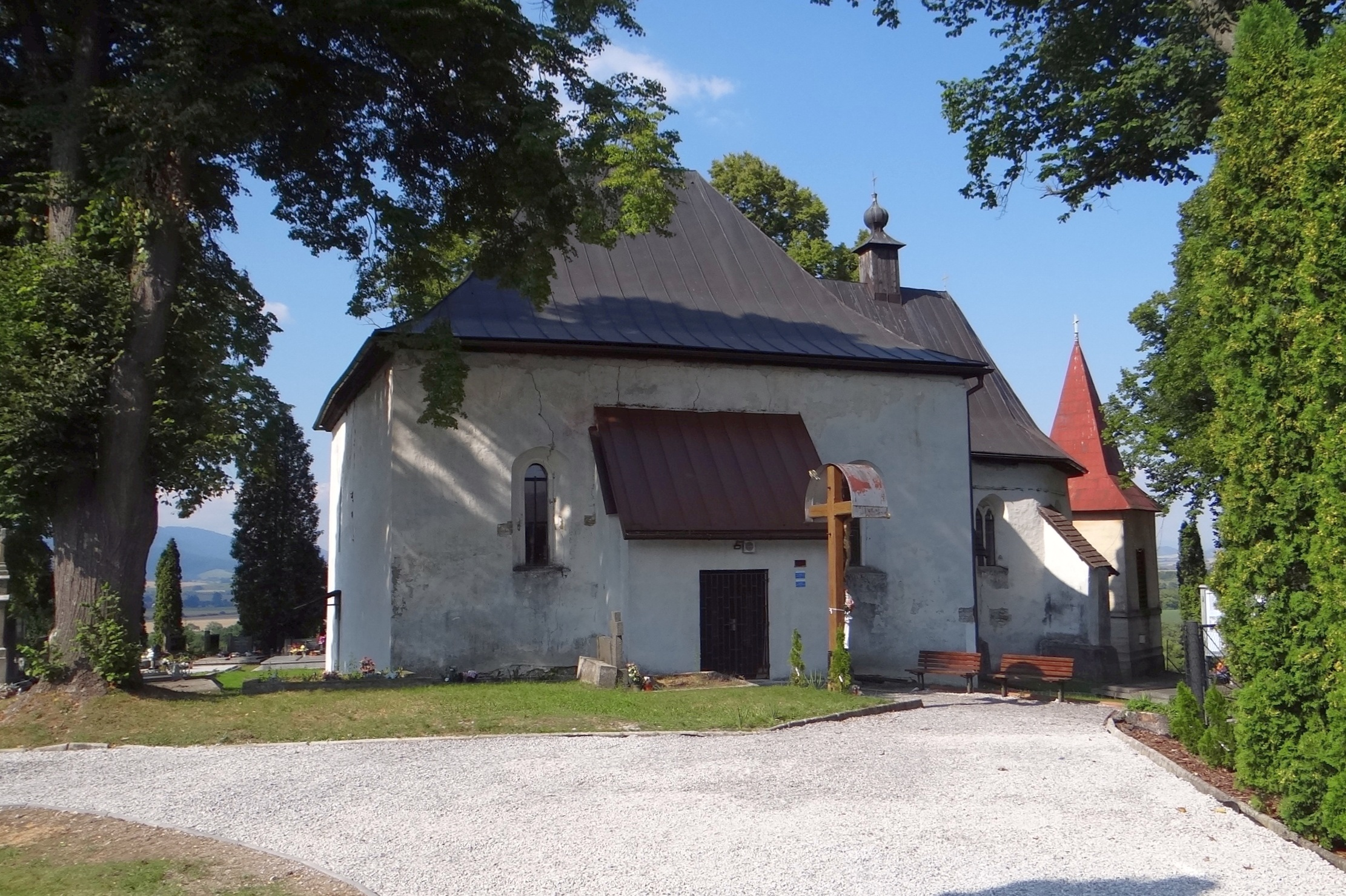 Socovce